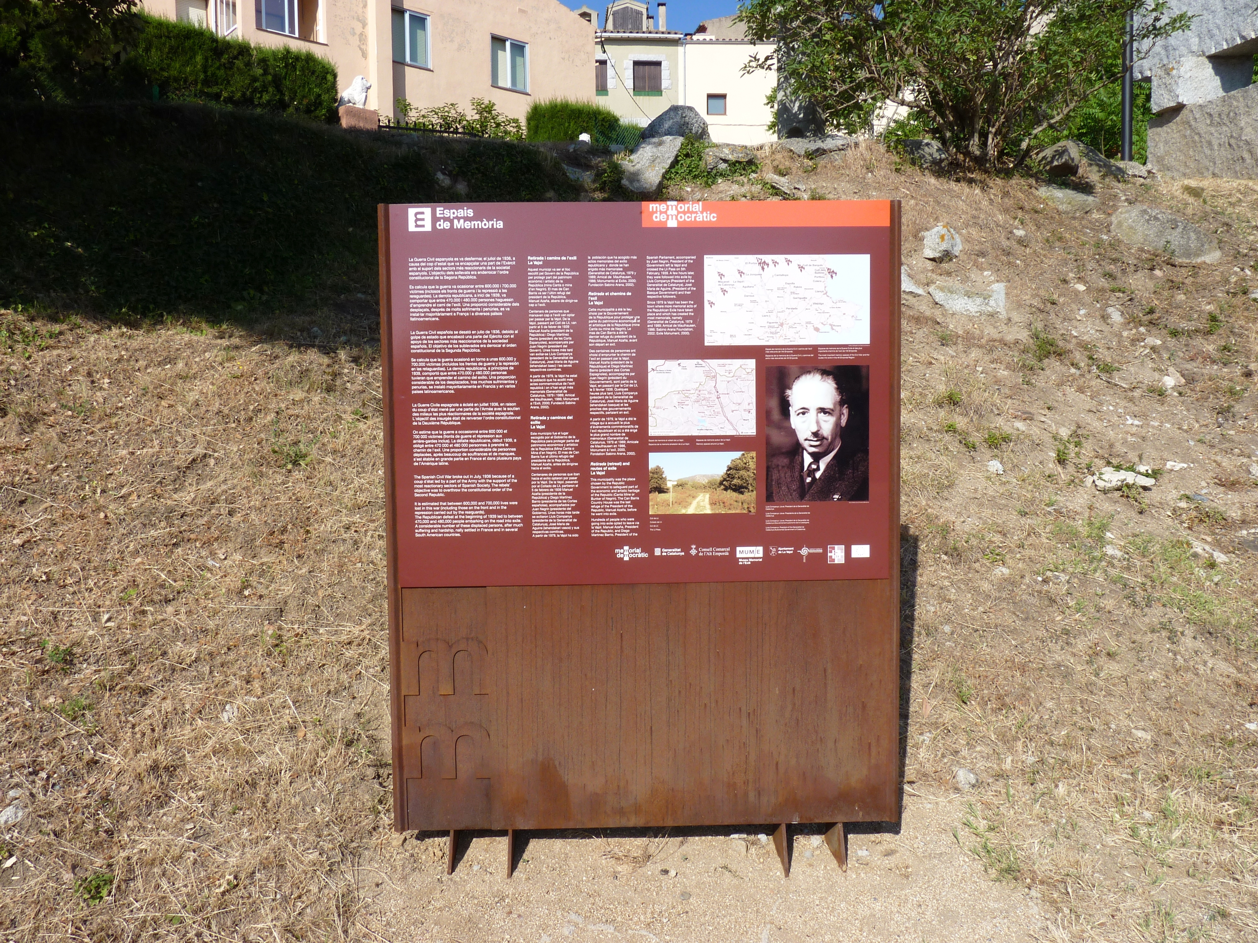 L'espace de mémoire dédié notamment à Lluís Companys, sur la commune de La Vajol (Haut-Ampurdan, Gérone, Catalogne, Espagne)